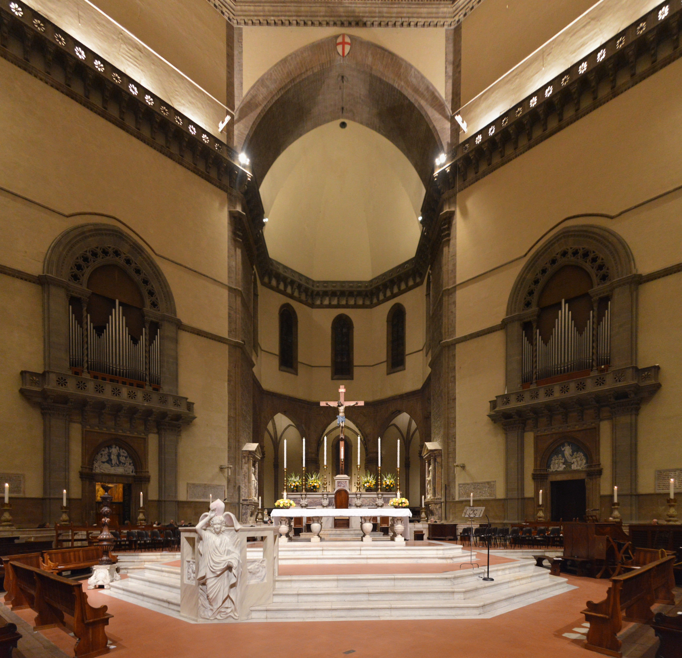 Il presbiterio.